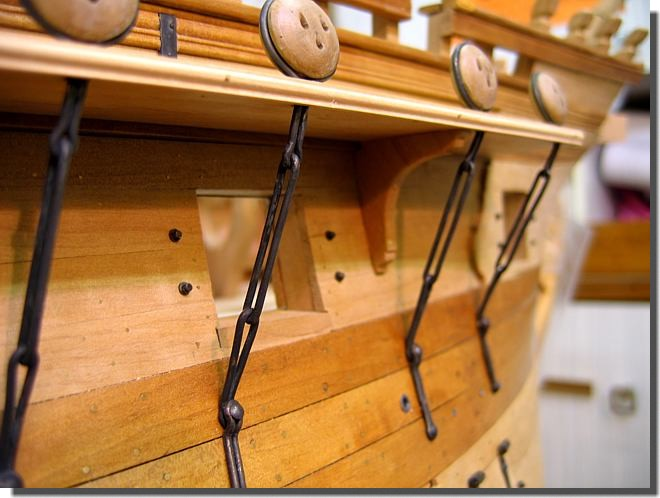 Le Fleuron - détail d'accastillage